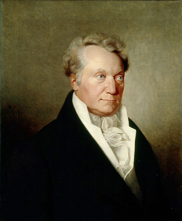 Bildnis Paul Usteri